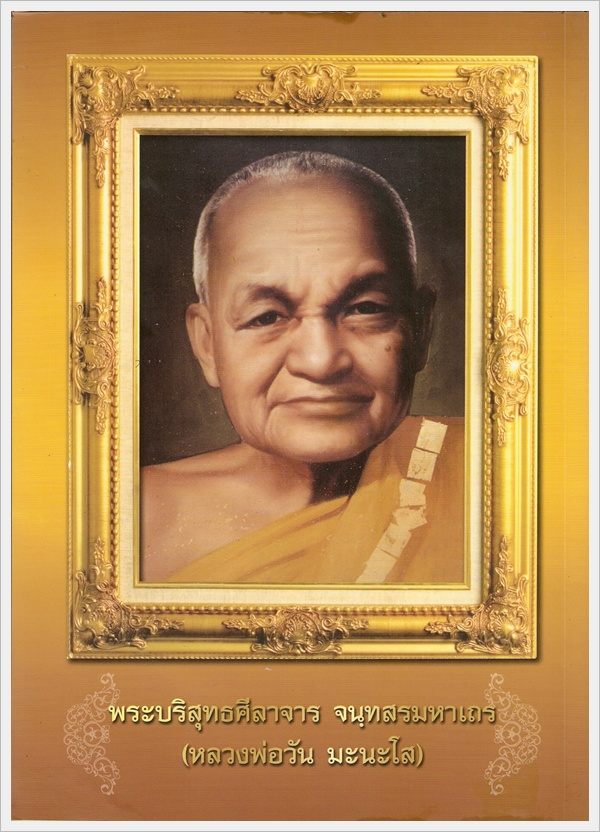 วัน